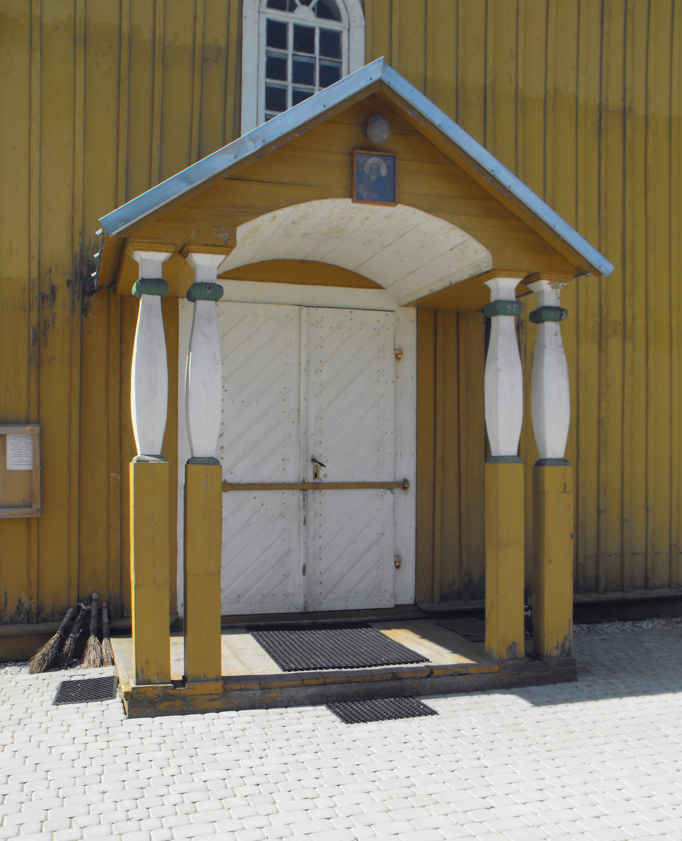 Cerkiew św. Jana Teologa w Nowoberezowie. Wejście frontowe.